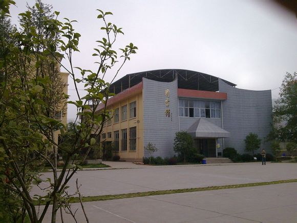 中文（中国大陆）: 建阳二中图书馆